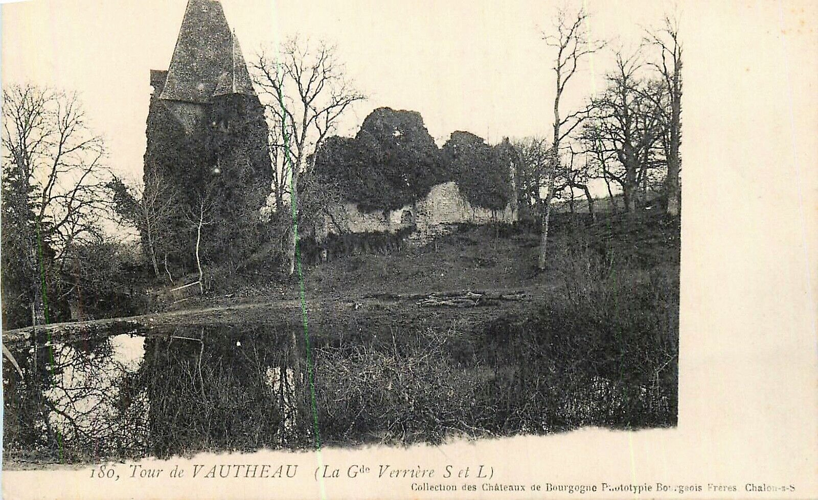 Château de Vautheau de La Grande-Verrière Saône-et-Loire